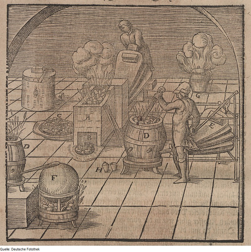 Original image description from the Deutsche Fotothek Metallurgie & Probierkunst & Kupfer & Ofen & Tiegel